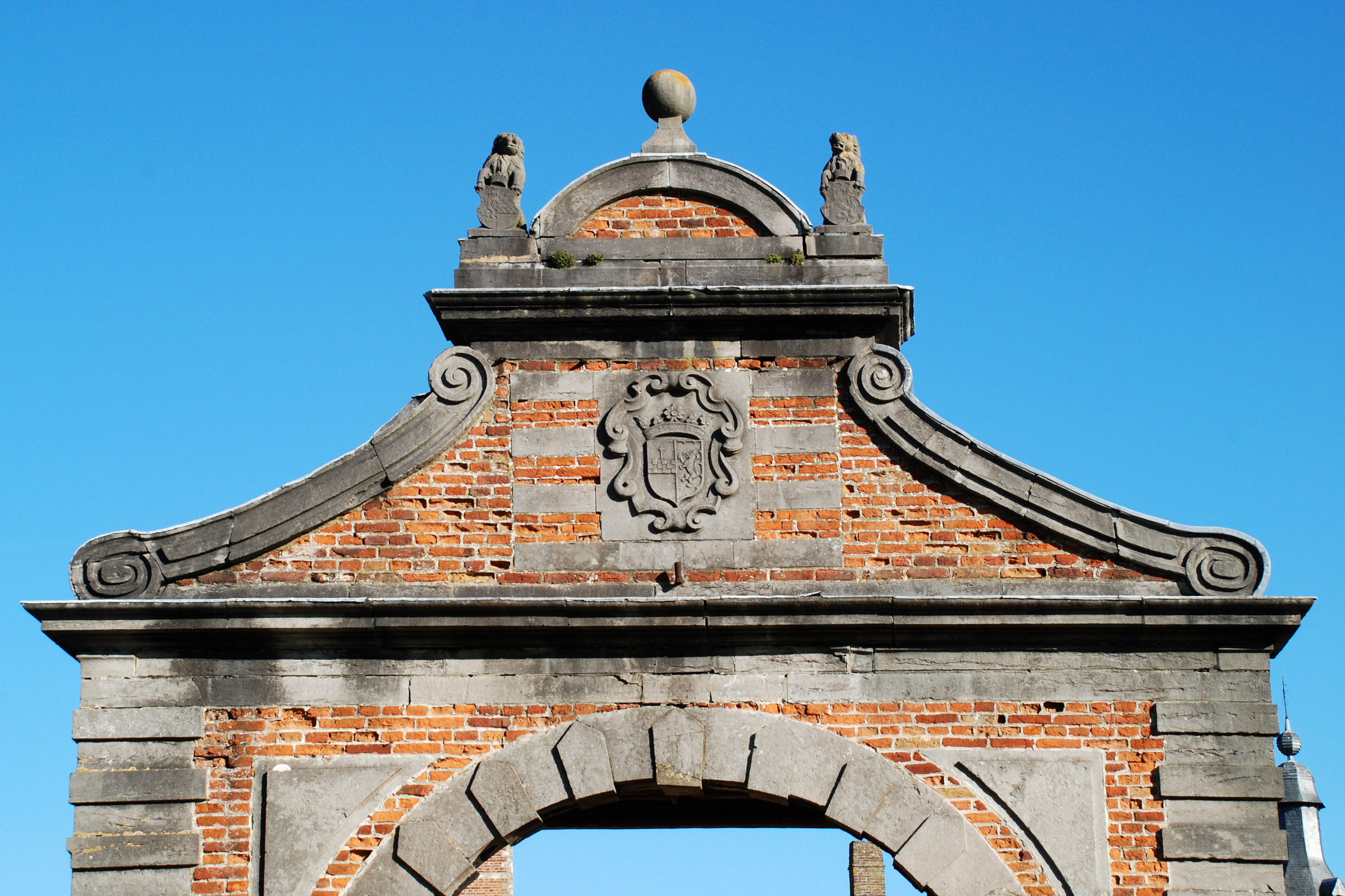 Belgique - Brabant wallon - Château de Rixensart